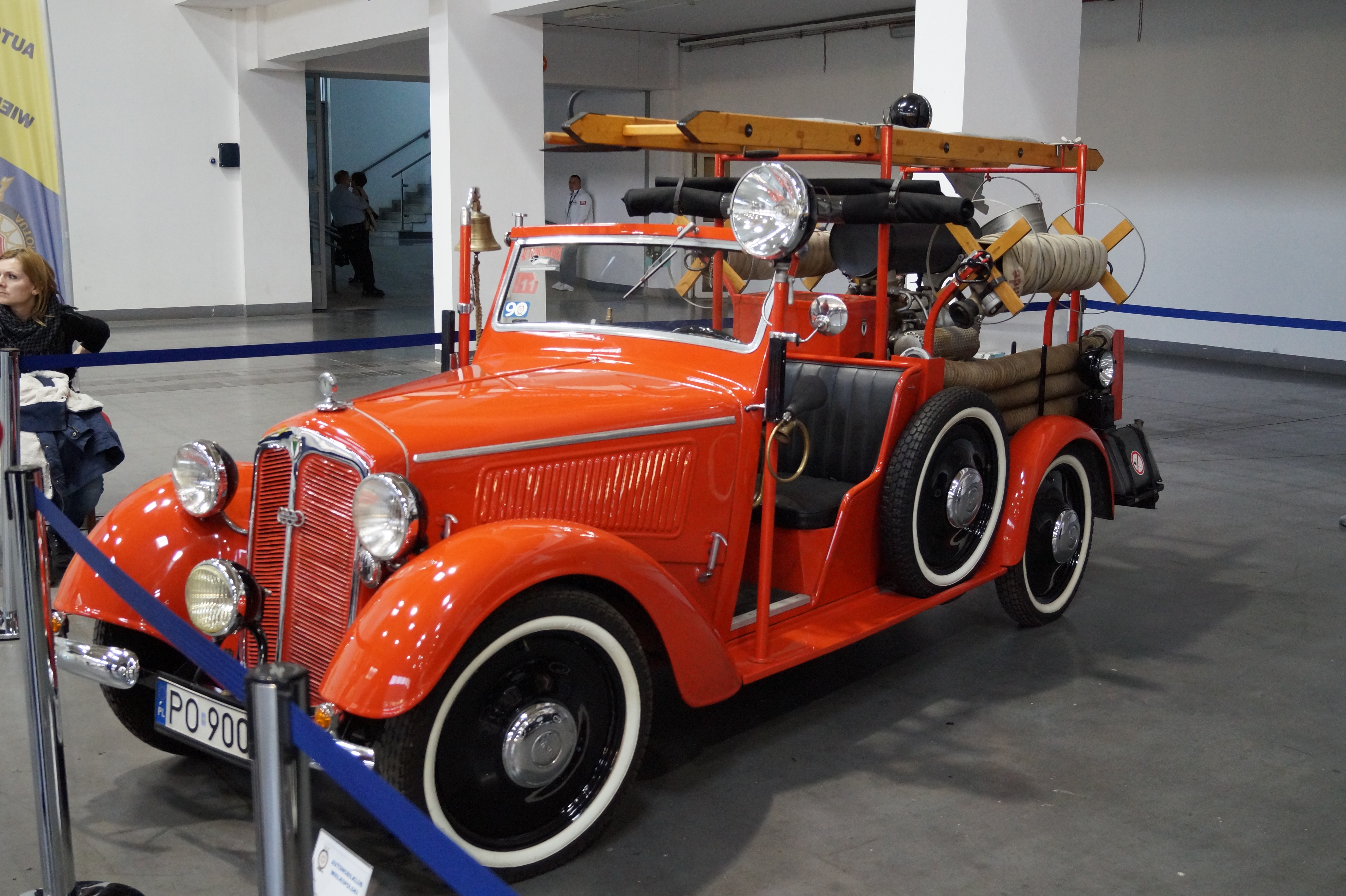 The making of this document was supported by Wikimedia Polska Association, within Wikigrant no. WG 2015-19. English | polski | +/− Zabytkowy wóz strażacki DKW F5 na Motor Show Poznań 2015